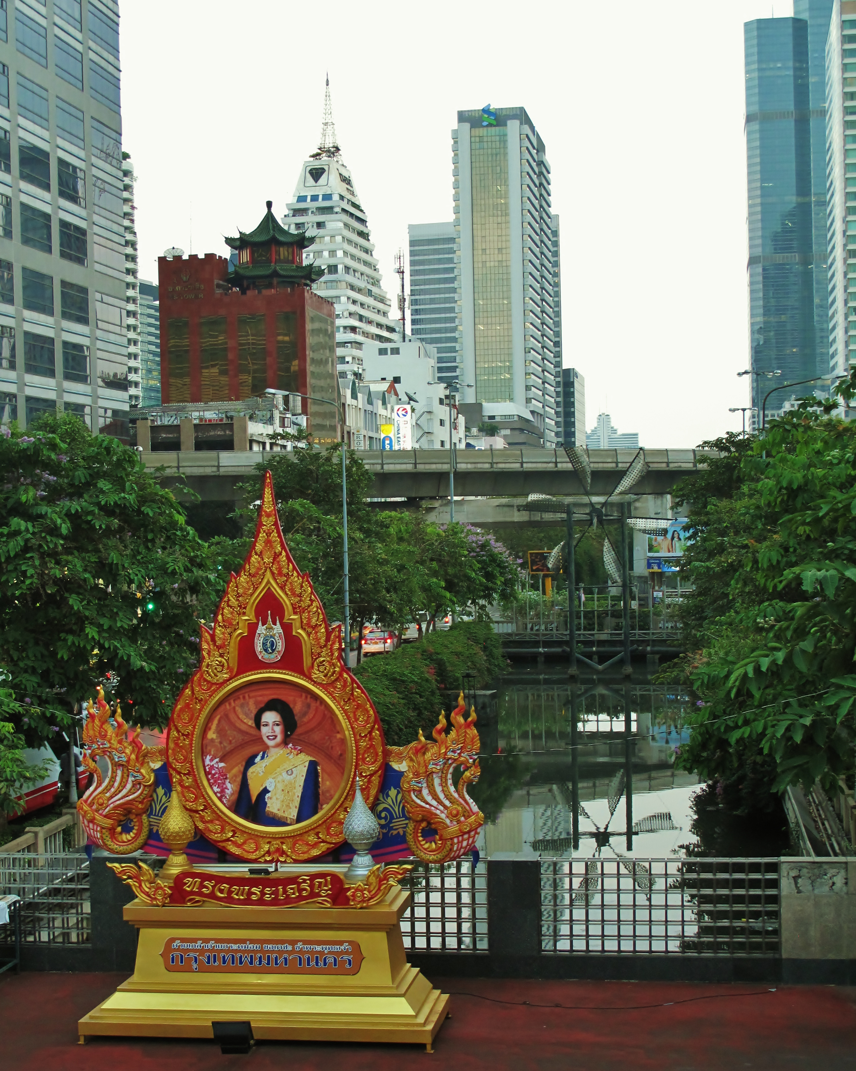 Naradhiwas Rajangarindra